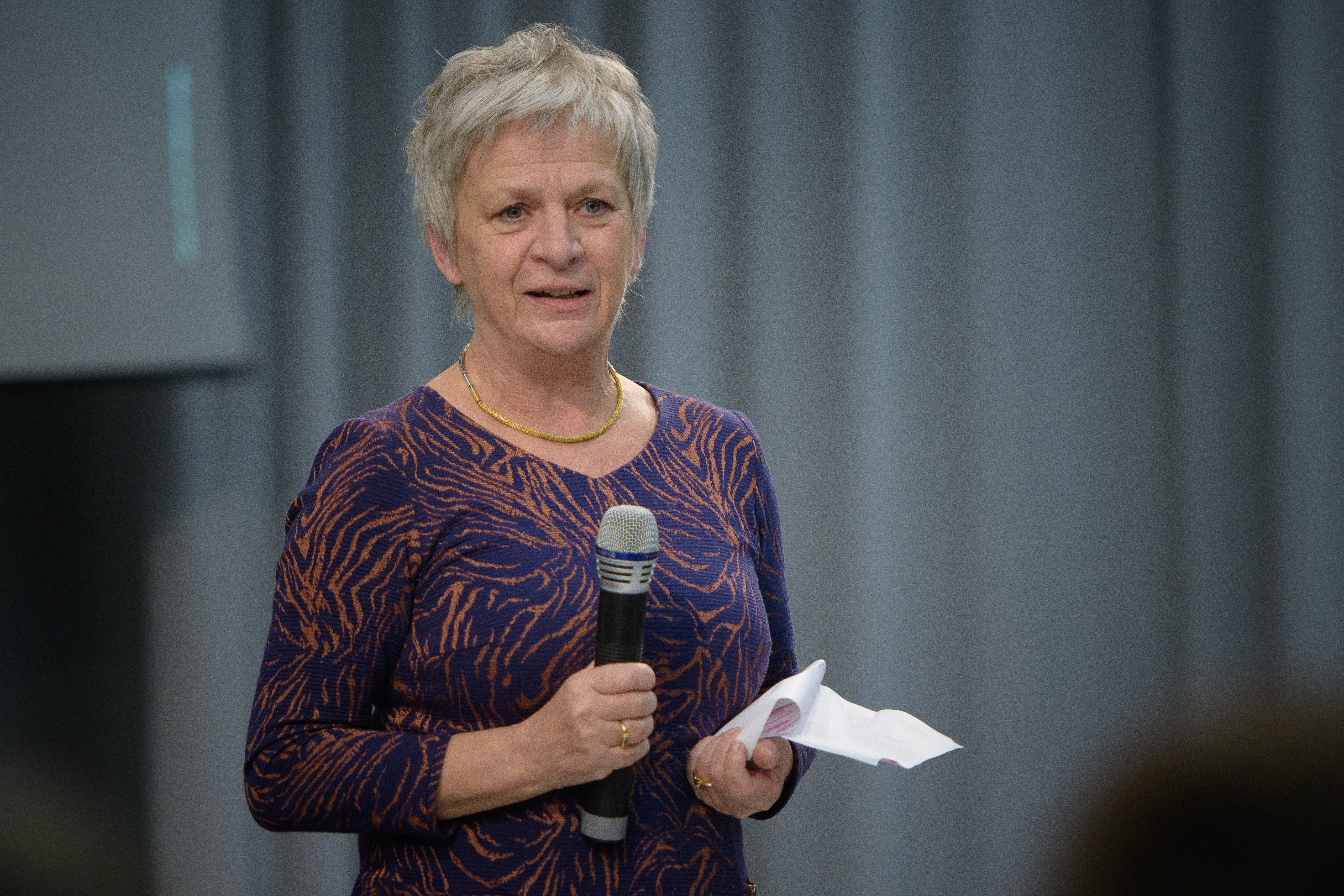 Barbara Unmüßig (Vorstand Heinrich-Böll-Stiftung)